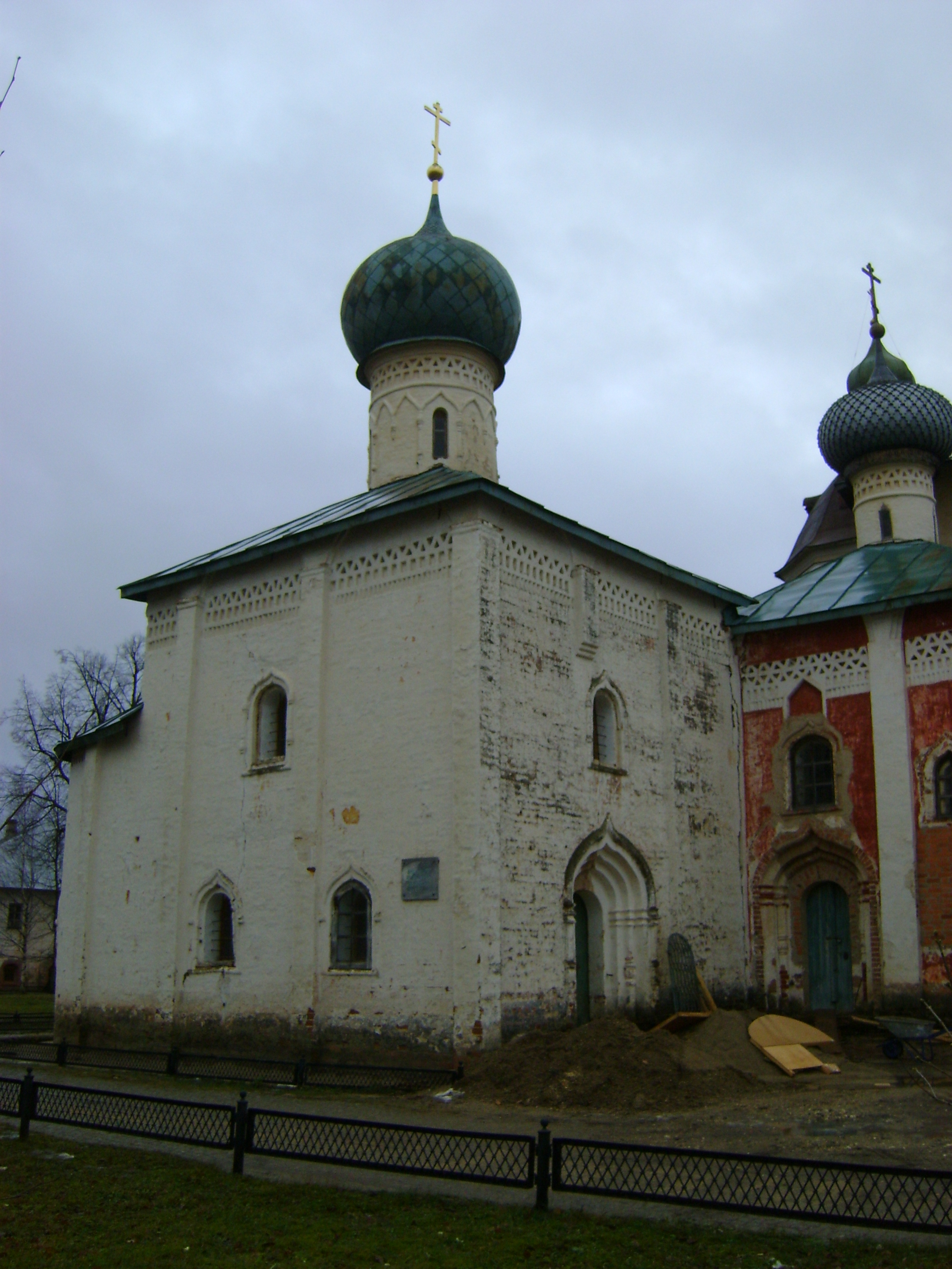 Церковь Епифания, Кирилло-Белозерский монастырь